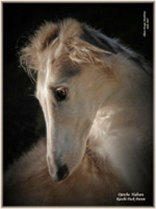 Djetcha Haltura Raschi Pack Buran, propr. Madeleine Gasser